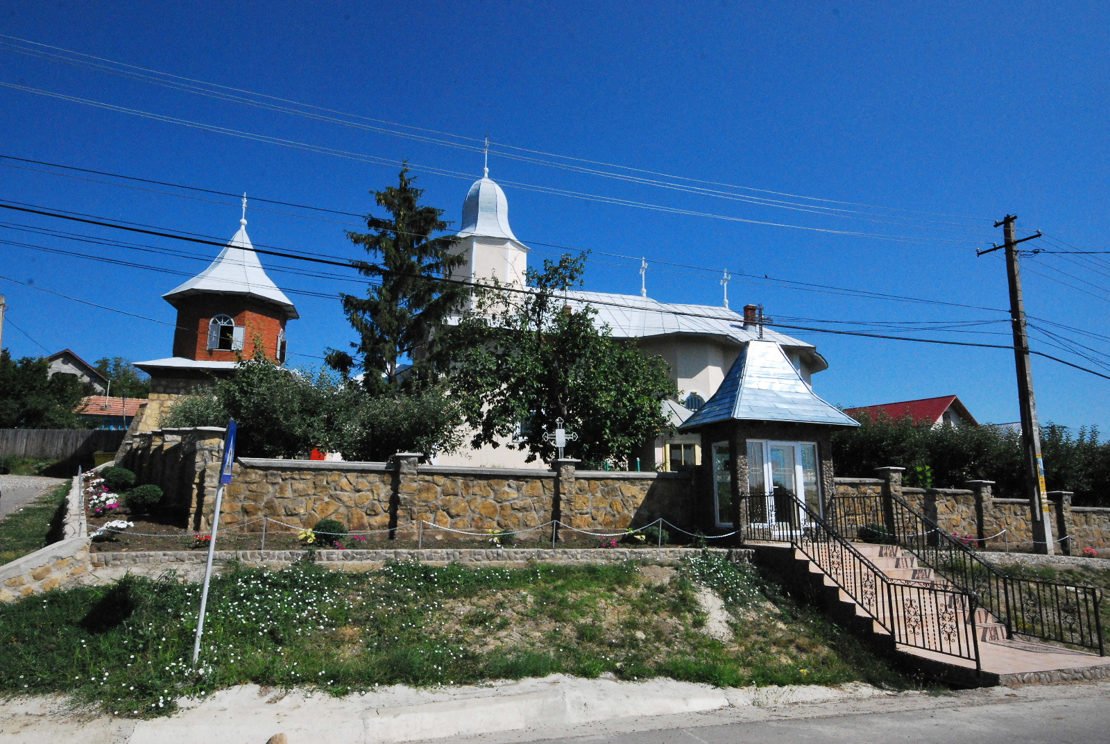 Biserica „Nașterea Sf. Ioan”